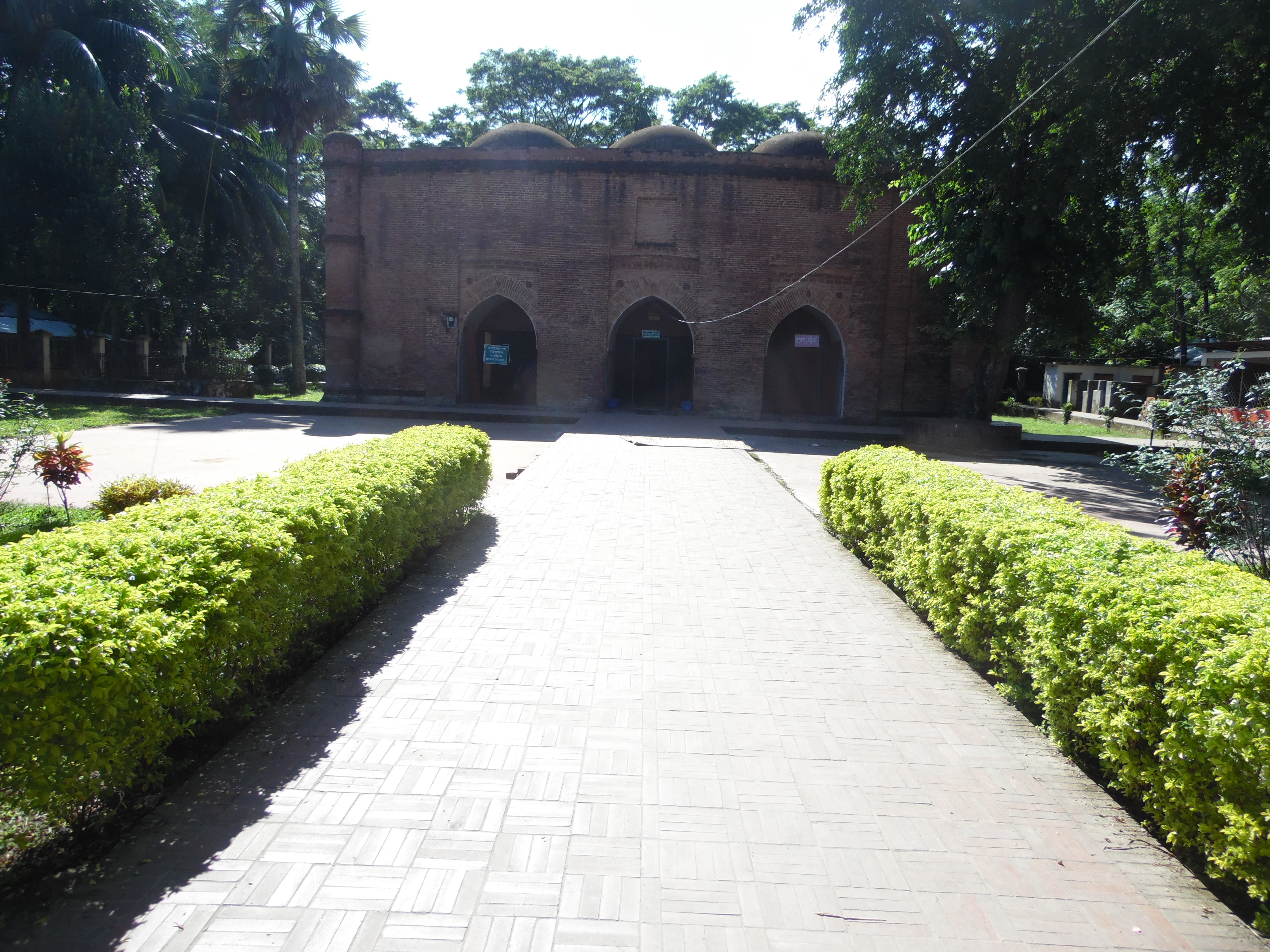 কসবা মসজিদ